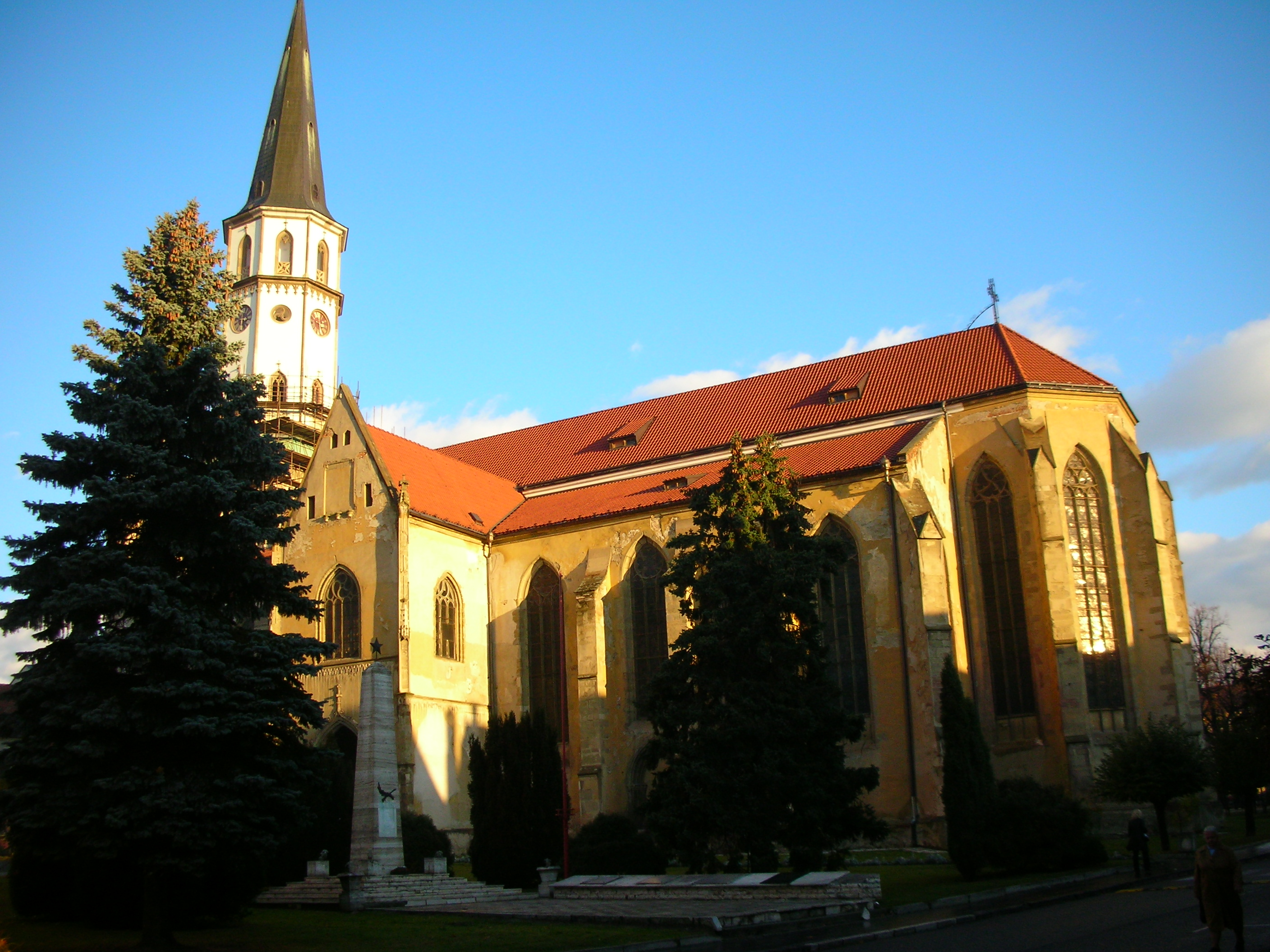 Chrám svätého Jakuba alebo kostol svätého Jakuba v Levoči je druhý najväčší kostol na Slovensku, národná kultúrna pamiatka, budova mimoriadneho umeleckohistorického významu. Je pôvodne gotický.